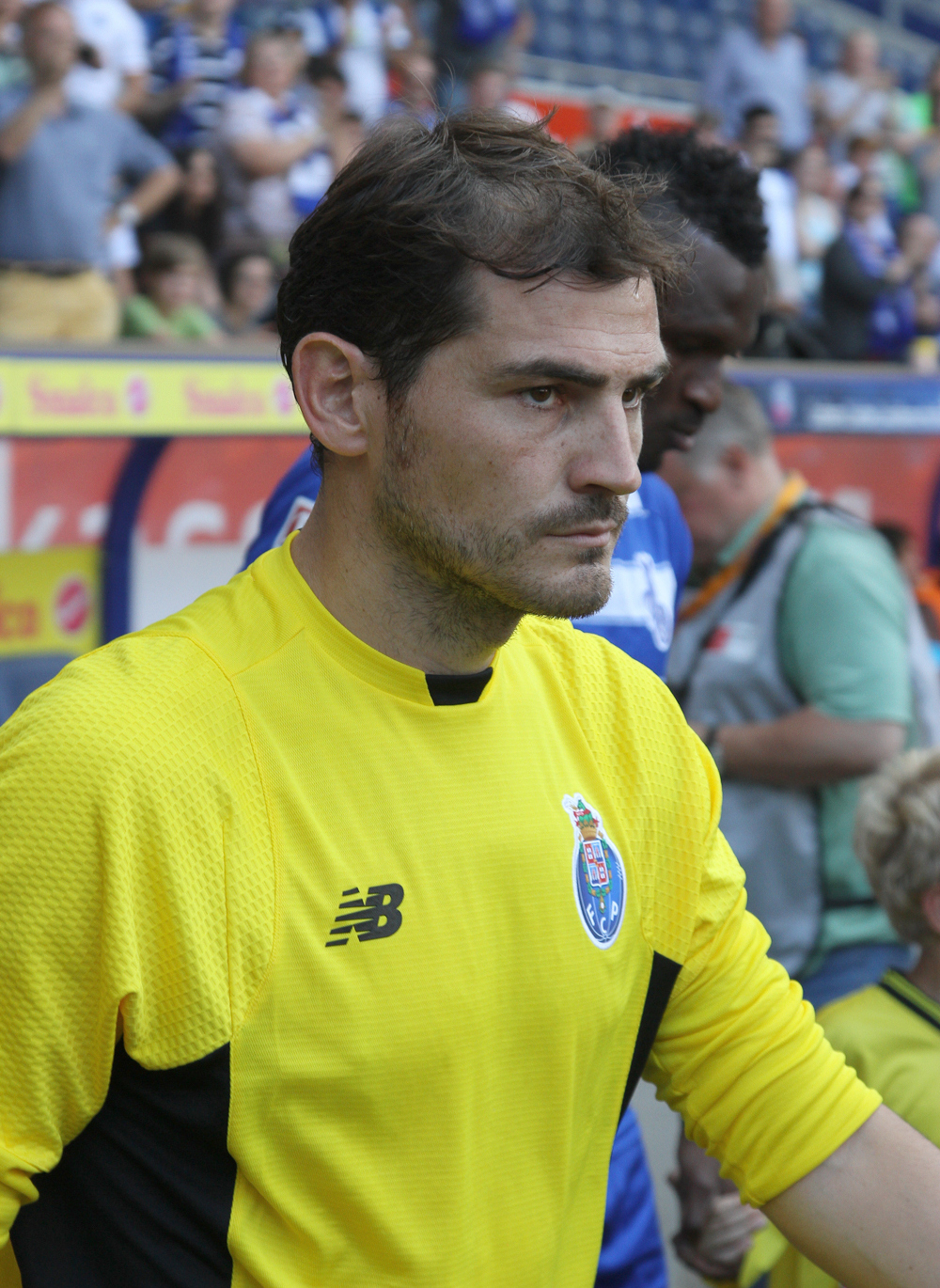 Iker Casillas